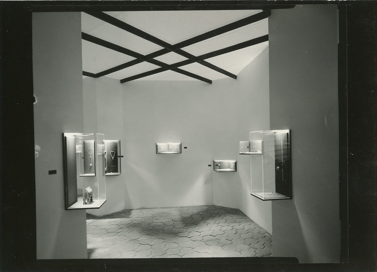 Servizio fotografico : Milano, 1973 / Paolo Monti. - Fototipi: 2 : Positivo b/n, gelatina bromuro d'argento/ carta, provino a contatto da pellicola 9x12. - ((Serie costituita da 2 provini a contatto identificati con i nn.: 2107 e 2112. Al verso dei provini manoscritto: "Triennale, exibition/ of jewellery". La suddetta serie è contenuta nella scatola identificata con la numerazione 06. Sul coperchio iscrizione manoscritta a pennarello: "Contatti architet.". - Fonte: Rubrica di Paolo Monti: Archivio fino 1-4-1961/ 31-3-1963 (1961-1963), presso Archivio Paolo Monti